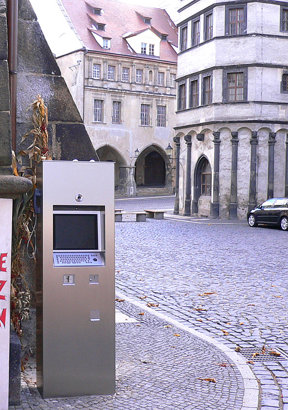 Outdoor-Kiosksystem in Görlitz